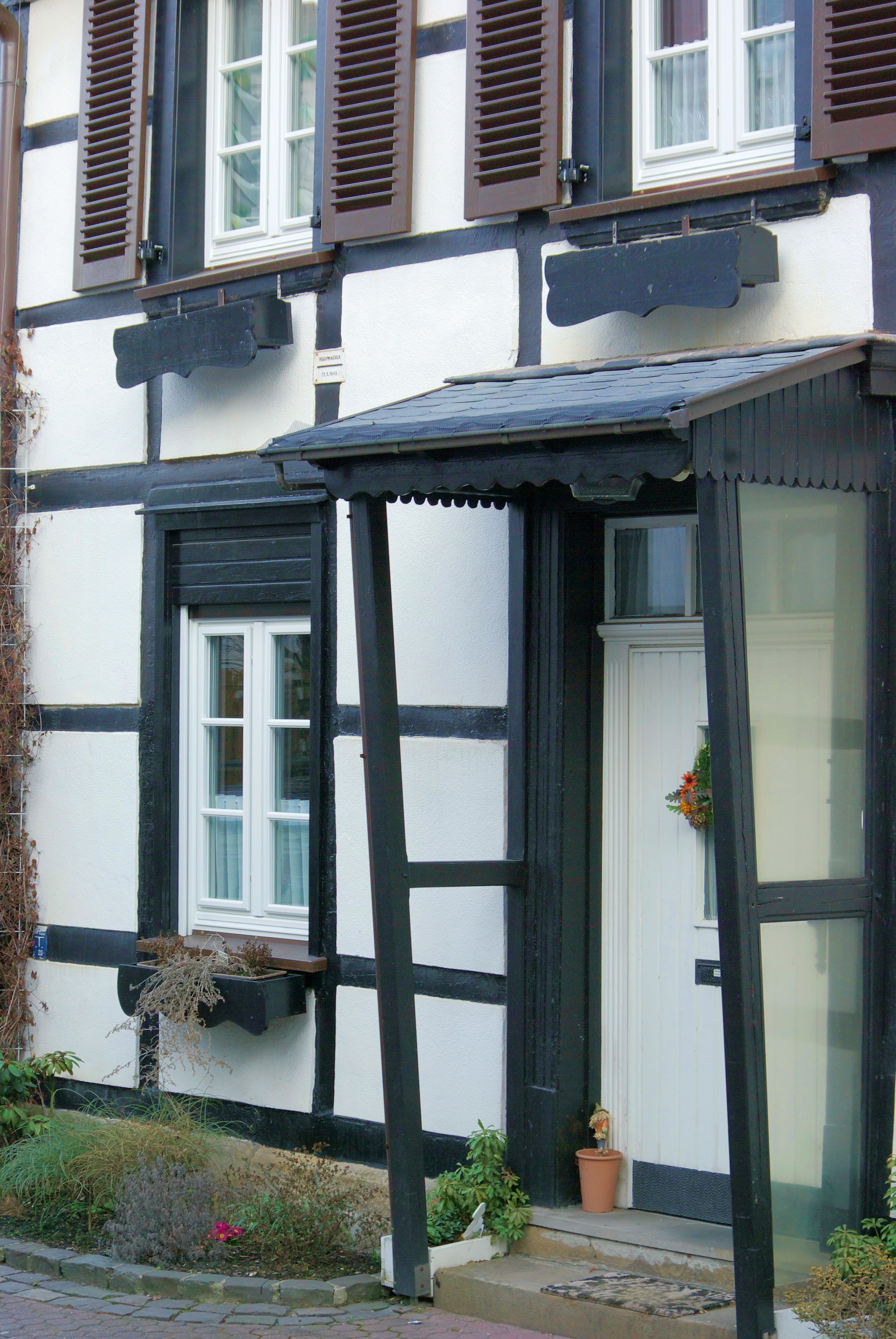 Fachwerkhaus Mühlenstraße 7 in Schwerte, Nordrhein-Westfalen mit Markierungsschild, das den Hochwasserstand nach dem Bruch der Möhneseestaumauer 1943 zeigt